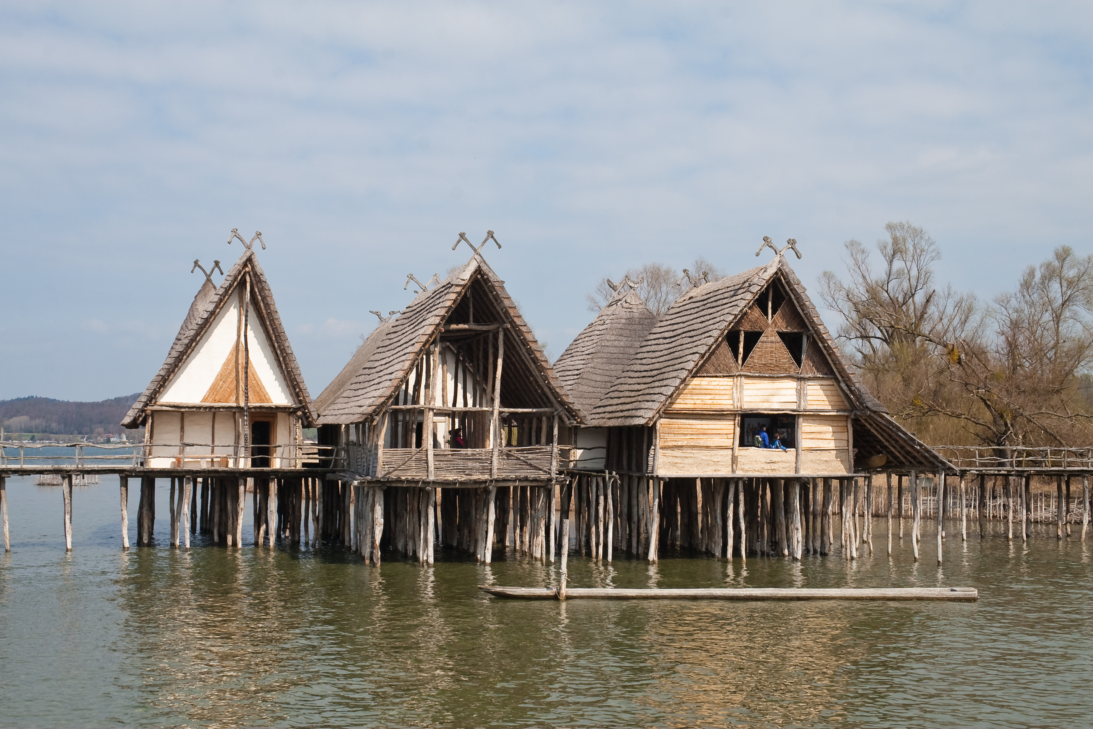 Pfahlbaumuseum Unteruhldingen, Uhldingen-Mühlhofen, Baden-Württemberg, Germany